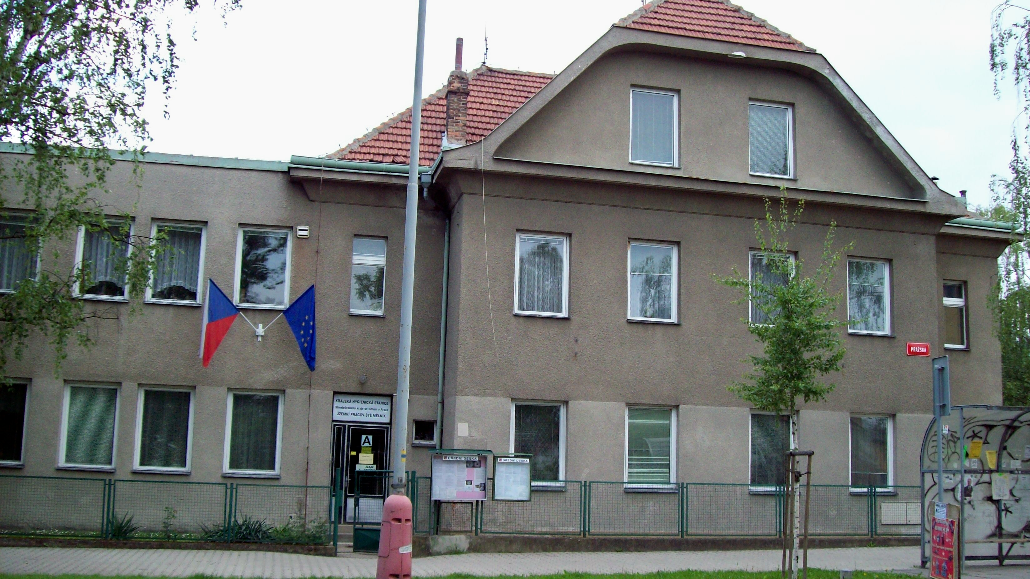 Krajská hygienická stanice, územní pracoviště Mělník, ul. Pražská 391.